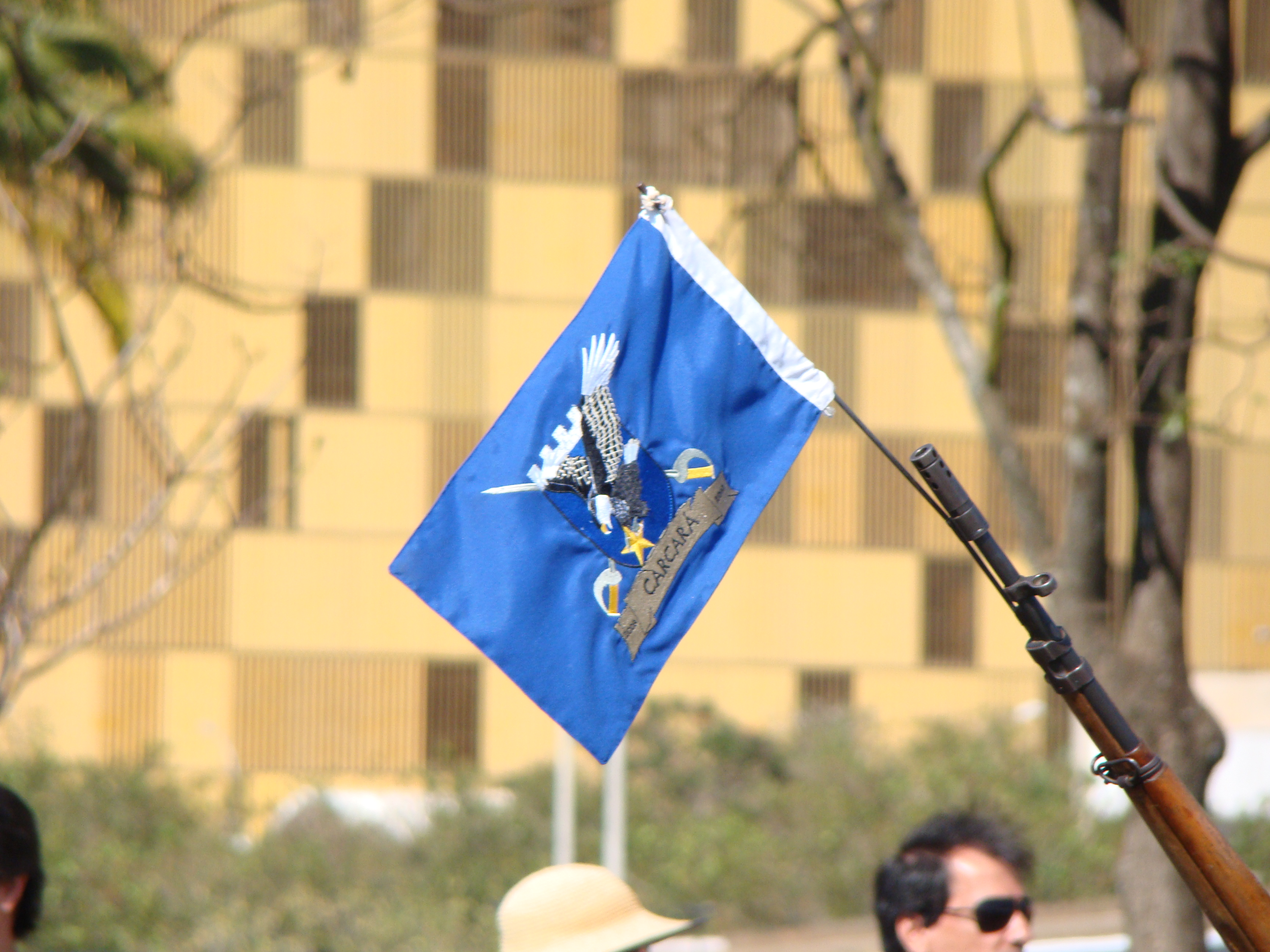 Curso de Formação de Oficiais Polícia Militar do Distrito Federal